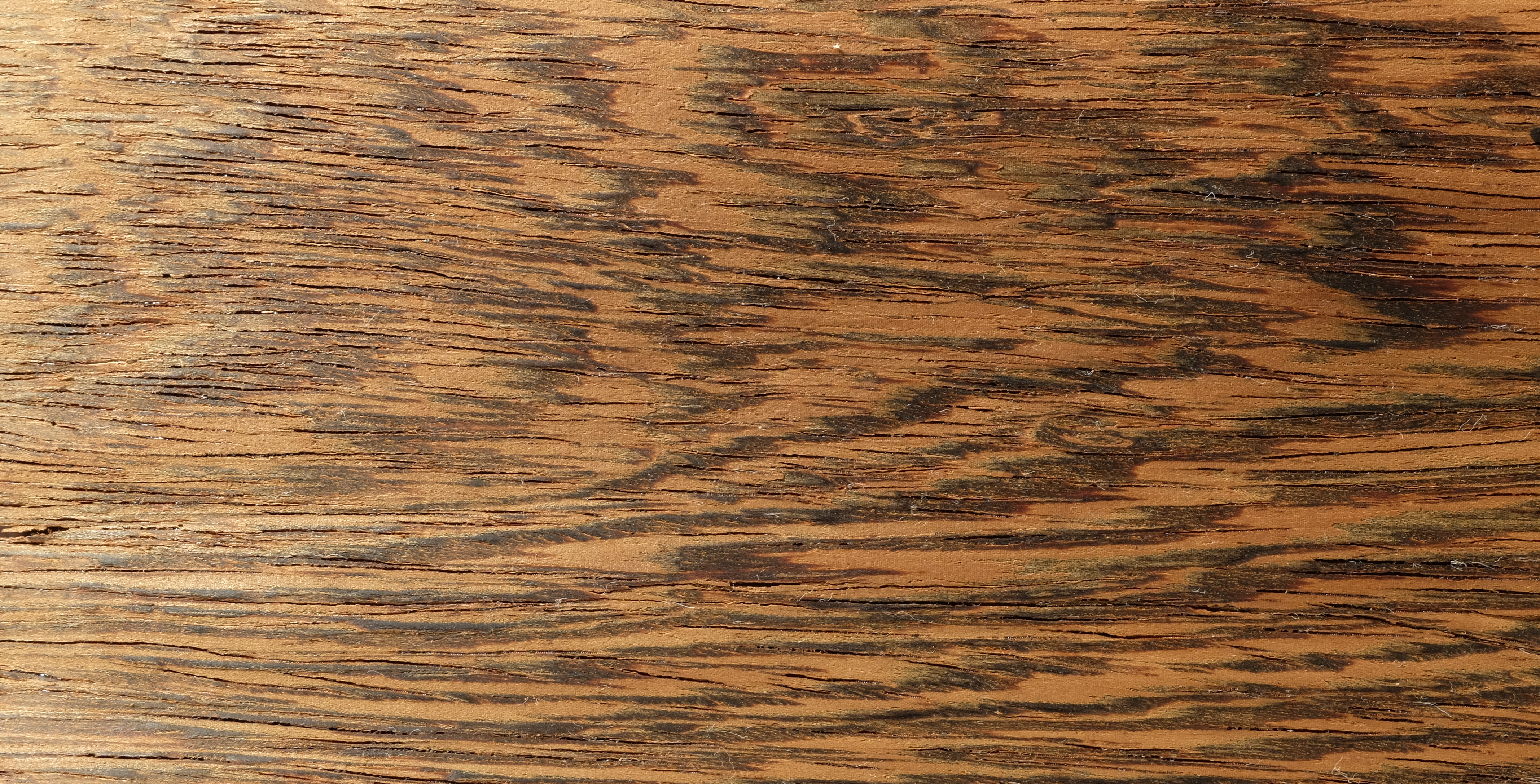 gemessertes Furnier; Holzart: WEN, Wenge, Awong, Bokonge, Monkonge